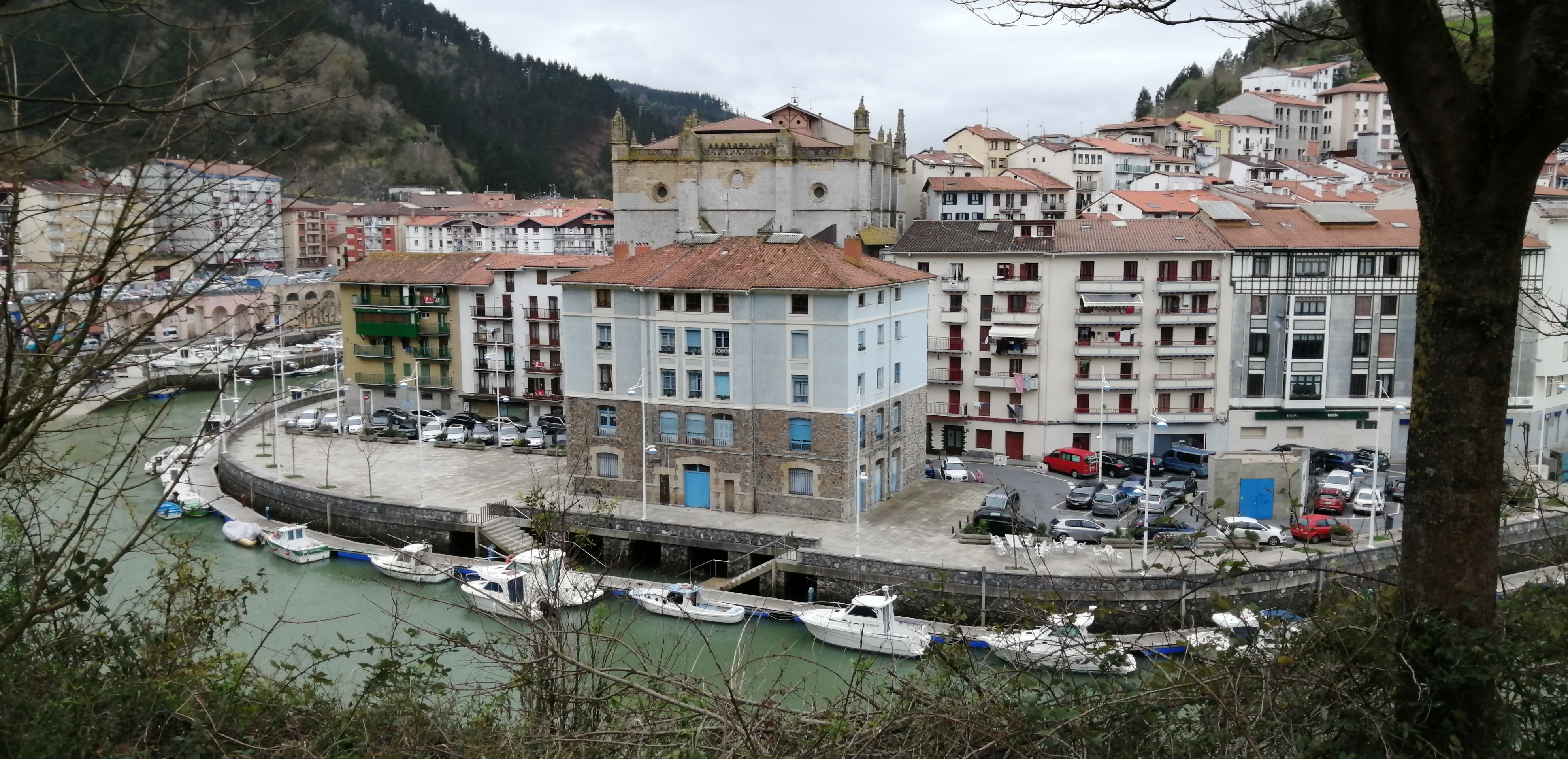 San Pedro kofradia ohiaren eraikina Ondarroan